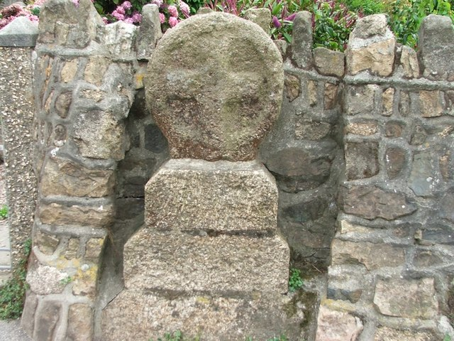 Village Cross